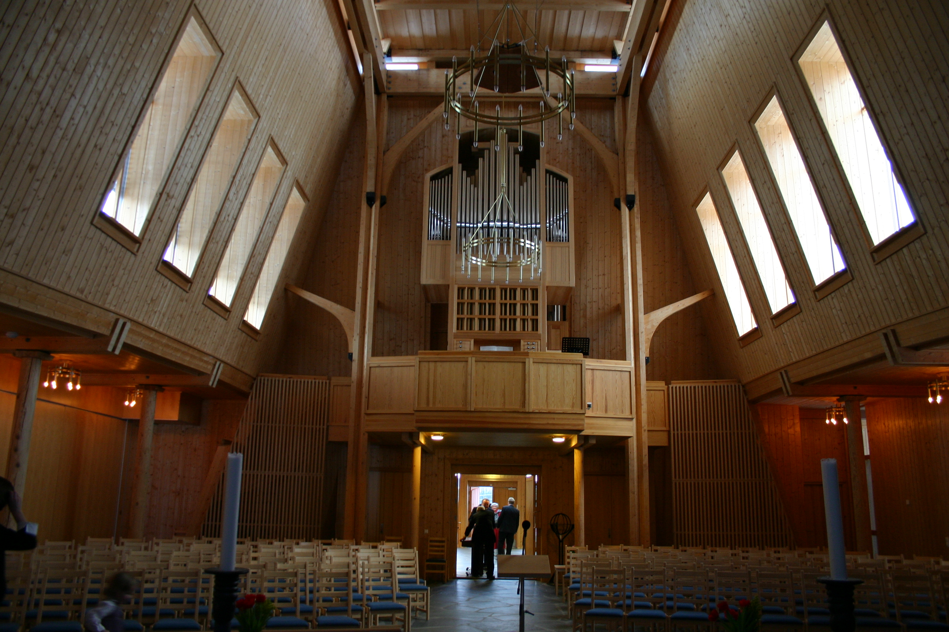 Interiør i Seegård kirke